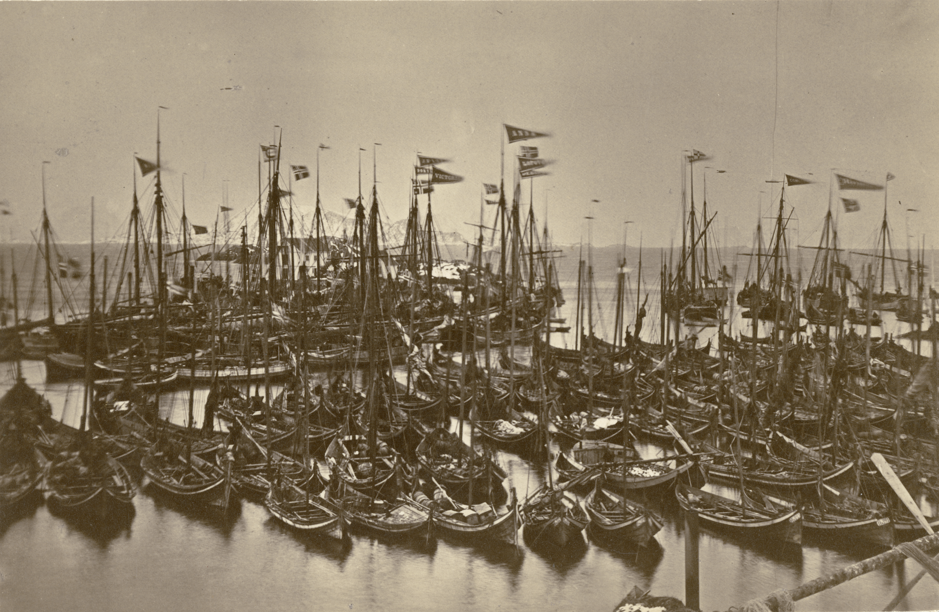 Kabelvåg i Vågan, Nordland